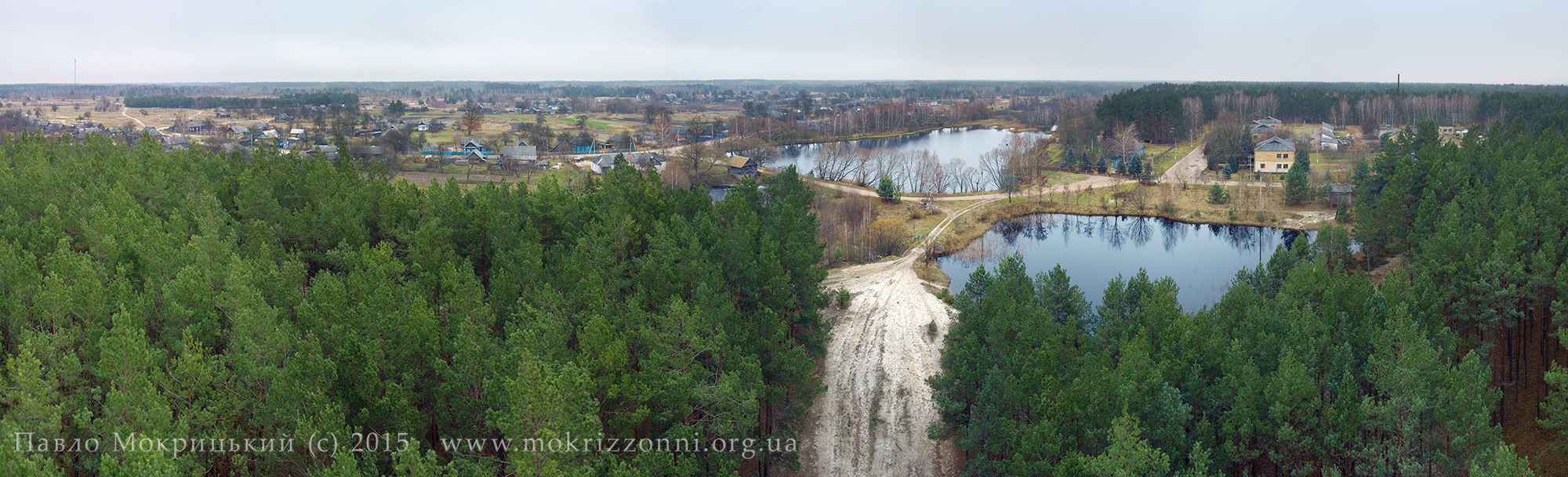 Поліський природний заповідник, Овруцький район, с. Селезівка, Копищанське і Перганське лісництва ДП «Олевське ЛГ» та Селезівське лісництво ДП «Словечанське ЛГ»